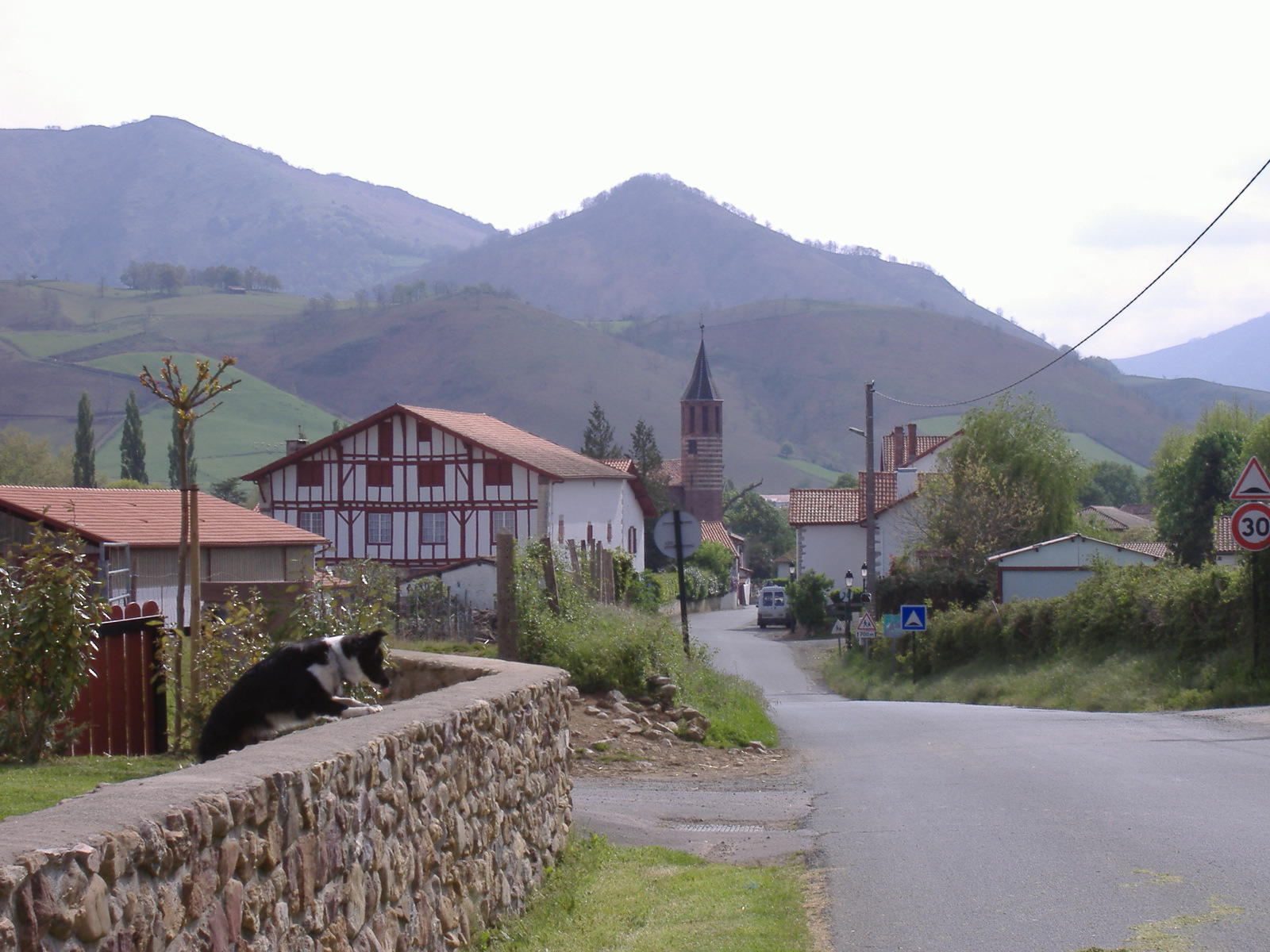 Vers l'église d'Ossès